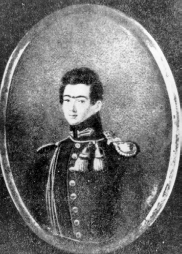 Early portrait of Mihail Kogălniceanu. First printed in Kogălniceanu, Mihail (1908): Iluzii perdute, București: Socec